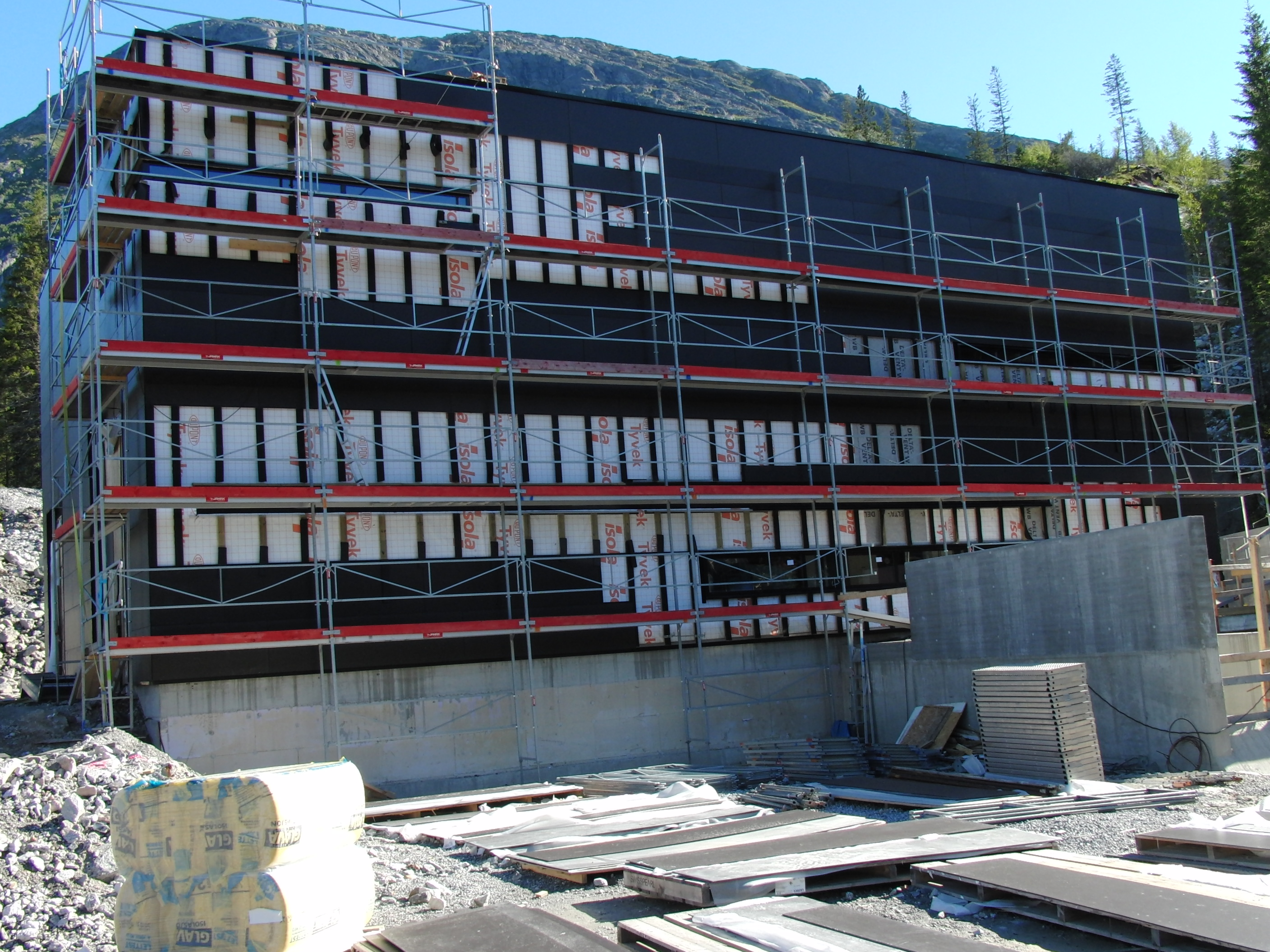 Storelva kraftverk (Tosen) under bygging i 2018